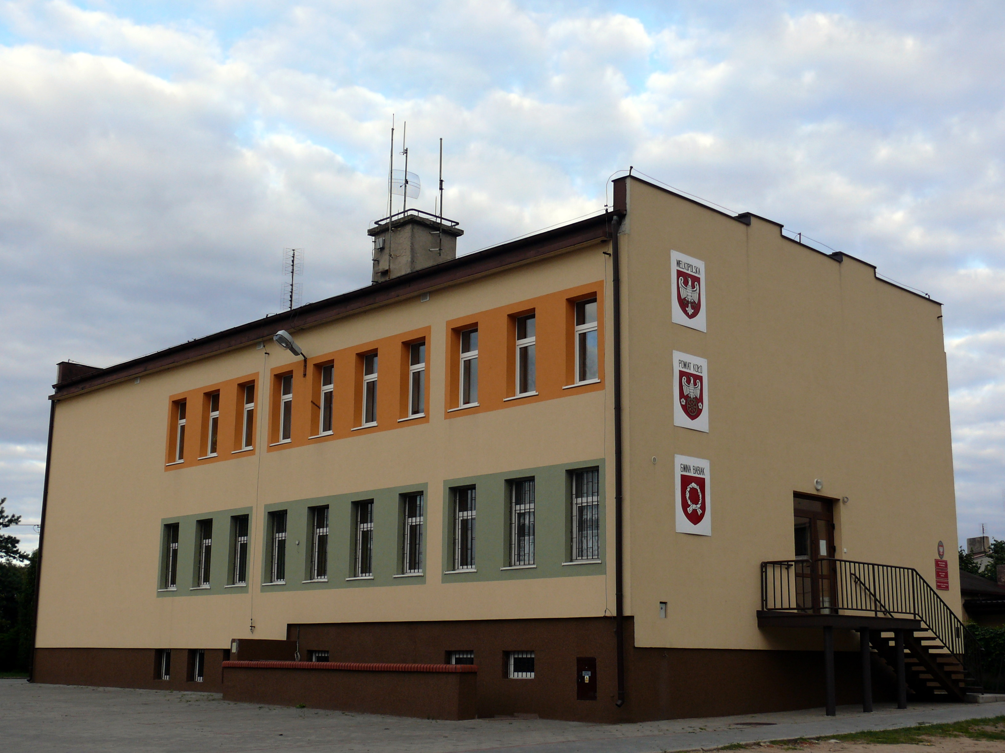 Gmach Urzędu Gminy w Babiaku